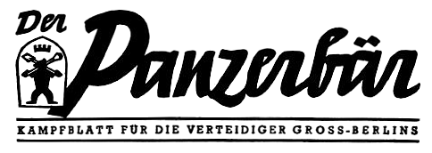 Logo der nationalsozialistischen Frontzeitung Der Panzerbär – Kampfblatt für die Verteidiger von Groß-Berlin